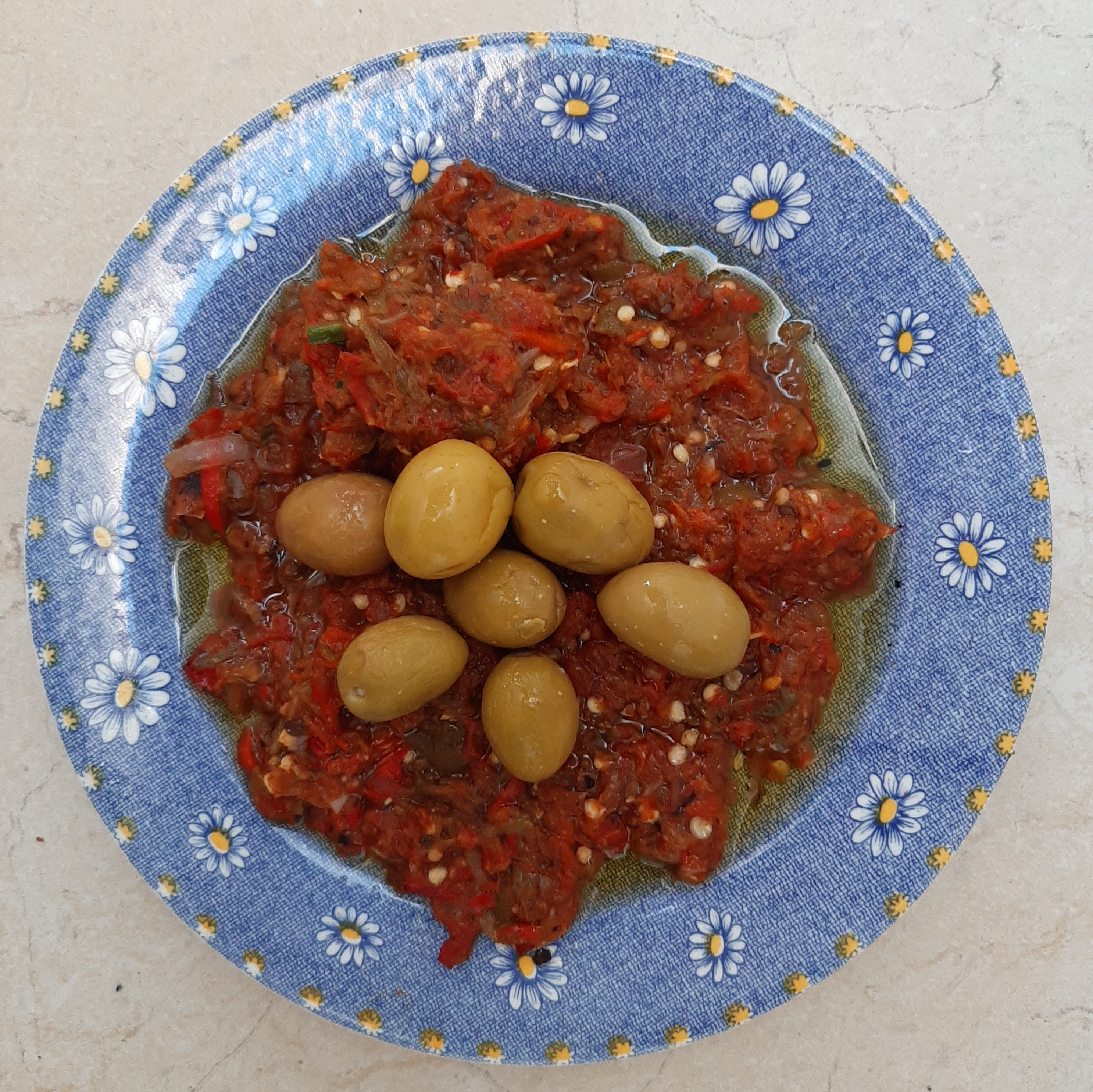 Slata mechwya, Tunisie